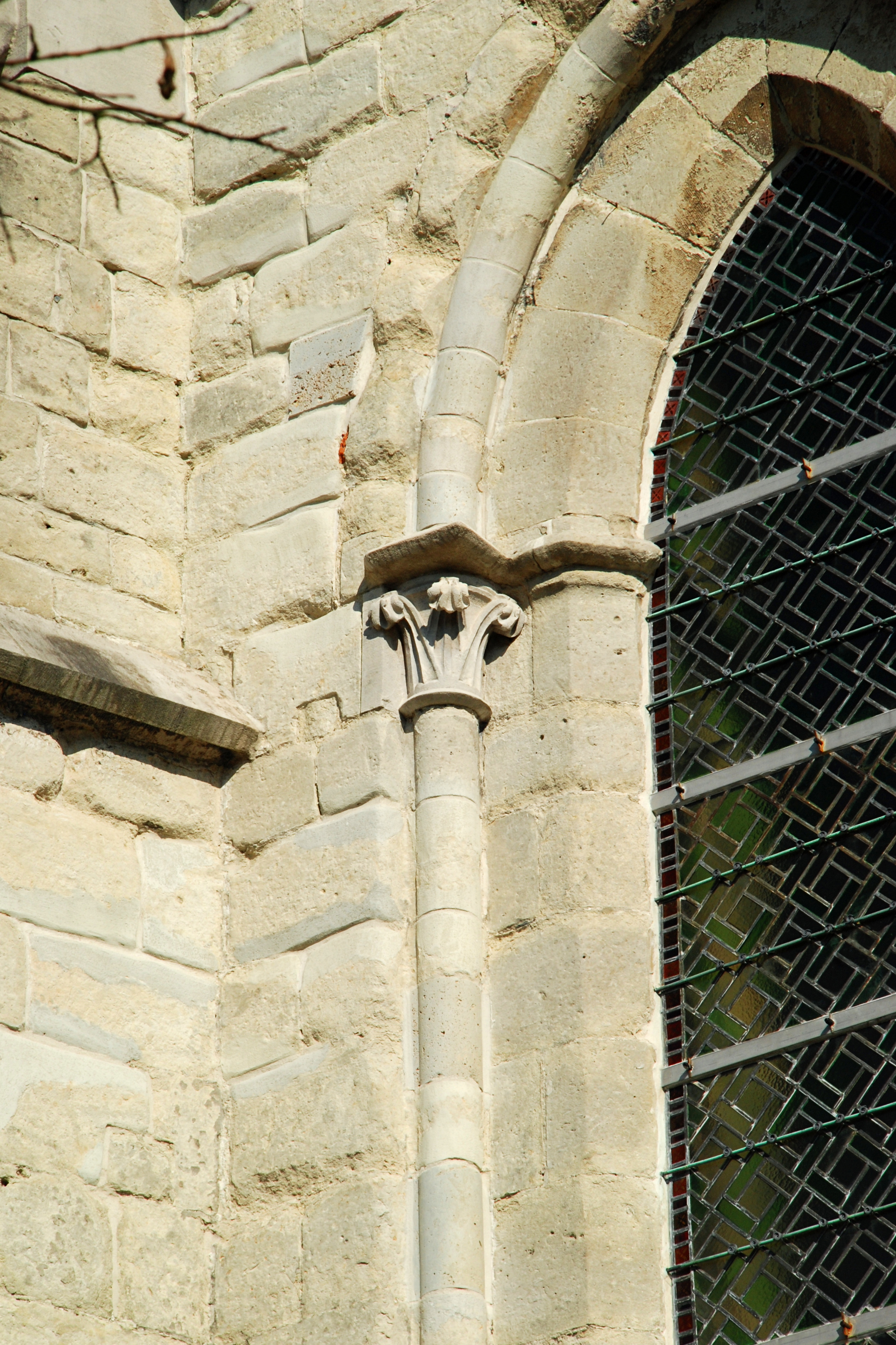 Belgique - Bruxelles - Ancienne église Notre-Dame de Laeken (gothique 13e siècle)